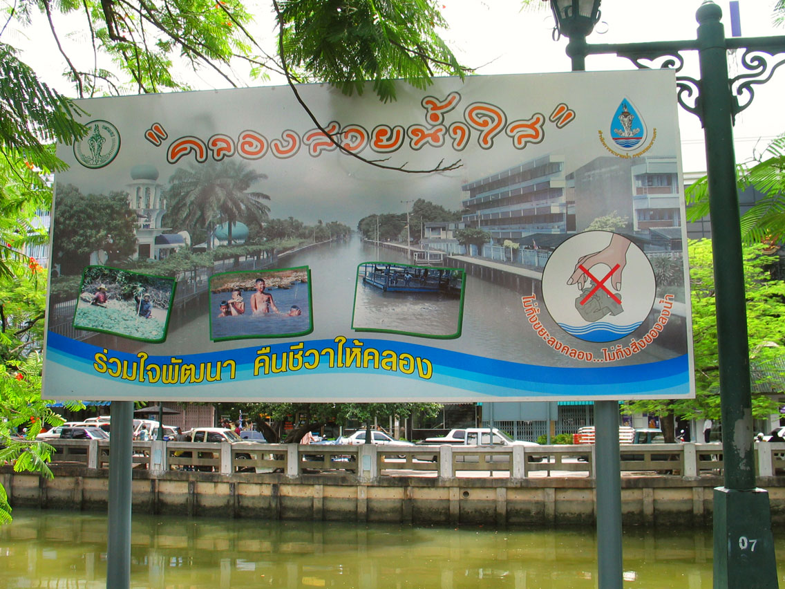 Sign "Keep your khlong clean", Khlong Padung Krung Kasem, Bangkok, Thailand